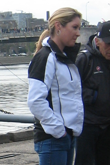 Start van de Amstel Gold Race Ladies Edition 2017 in Maastricht.